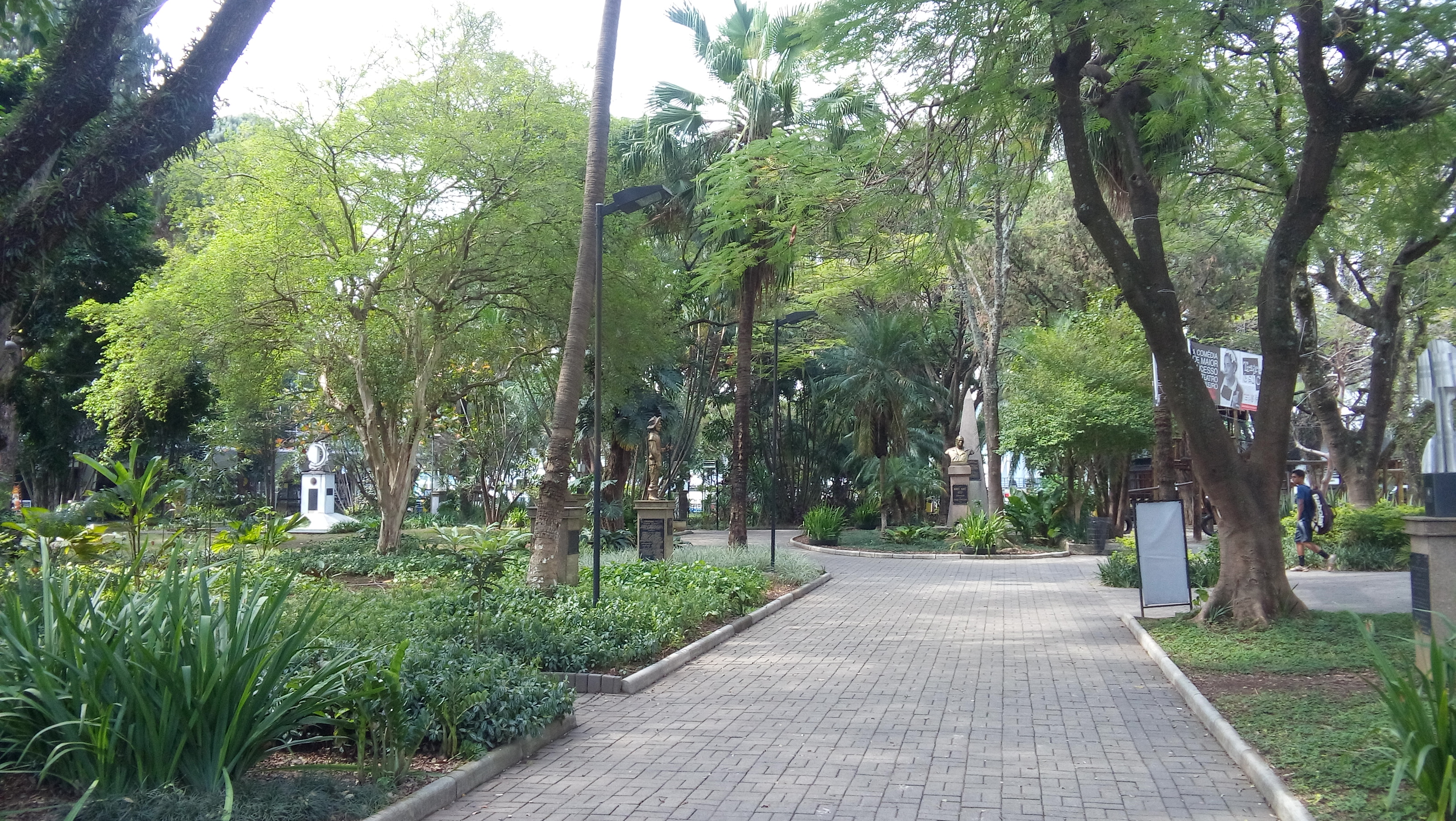 Jardins do Parque São Jorge - Corinthians